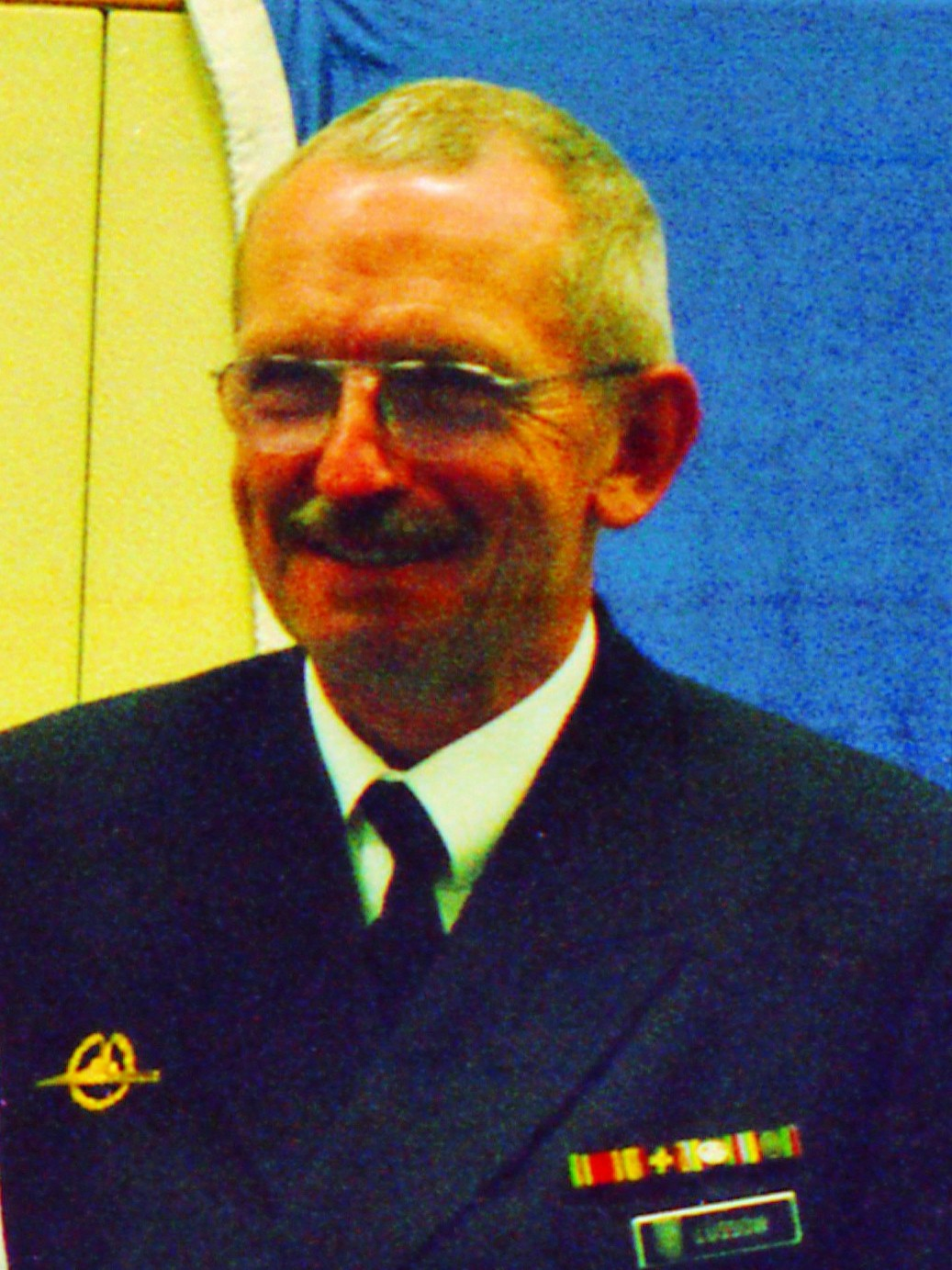 Vizeadmiral Hans Lüssow an der MUS in Plön nach der Vereidigung der Crew VII/2000